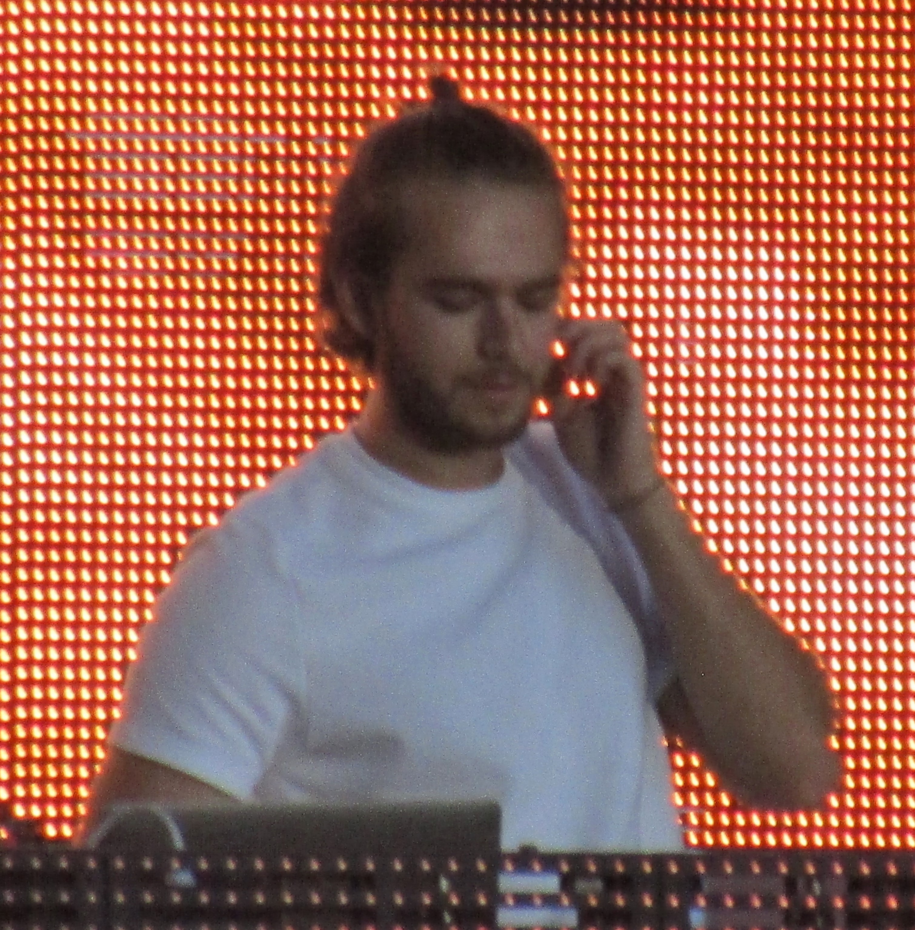 Zedd performing at LoveLoud 2018.